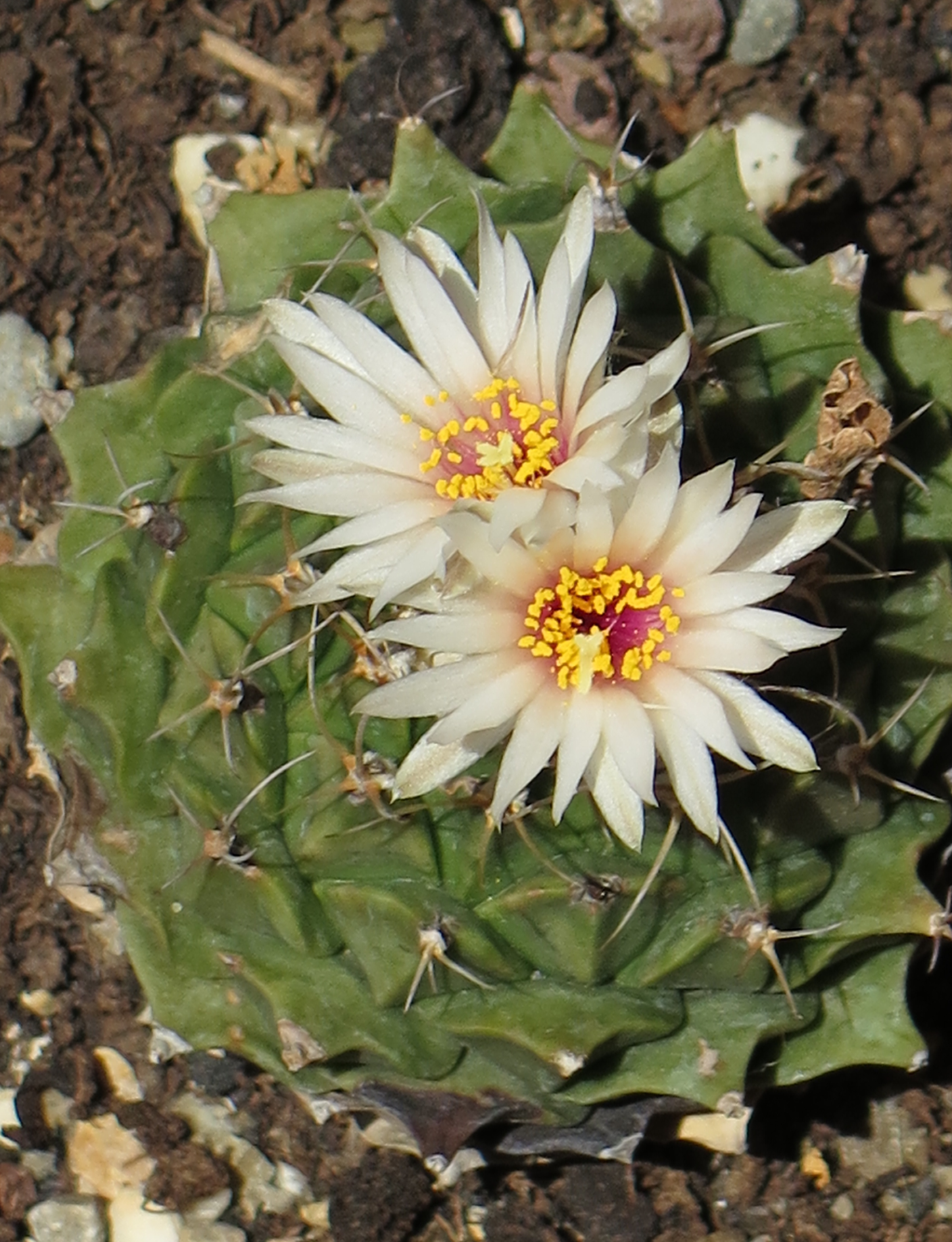 Obregonia denegrii in fiore